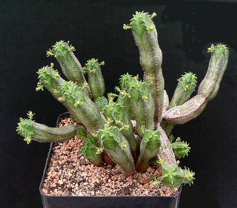 Euphorbia jansenvillensis